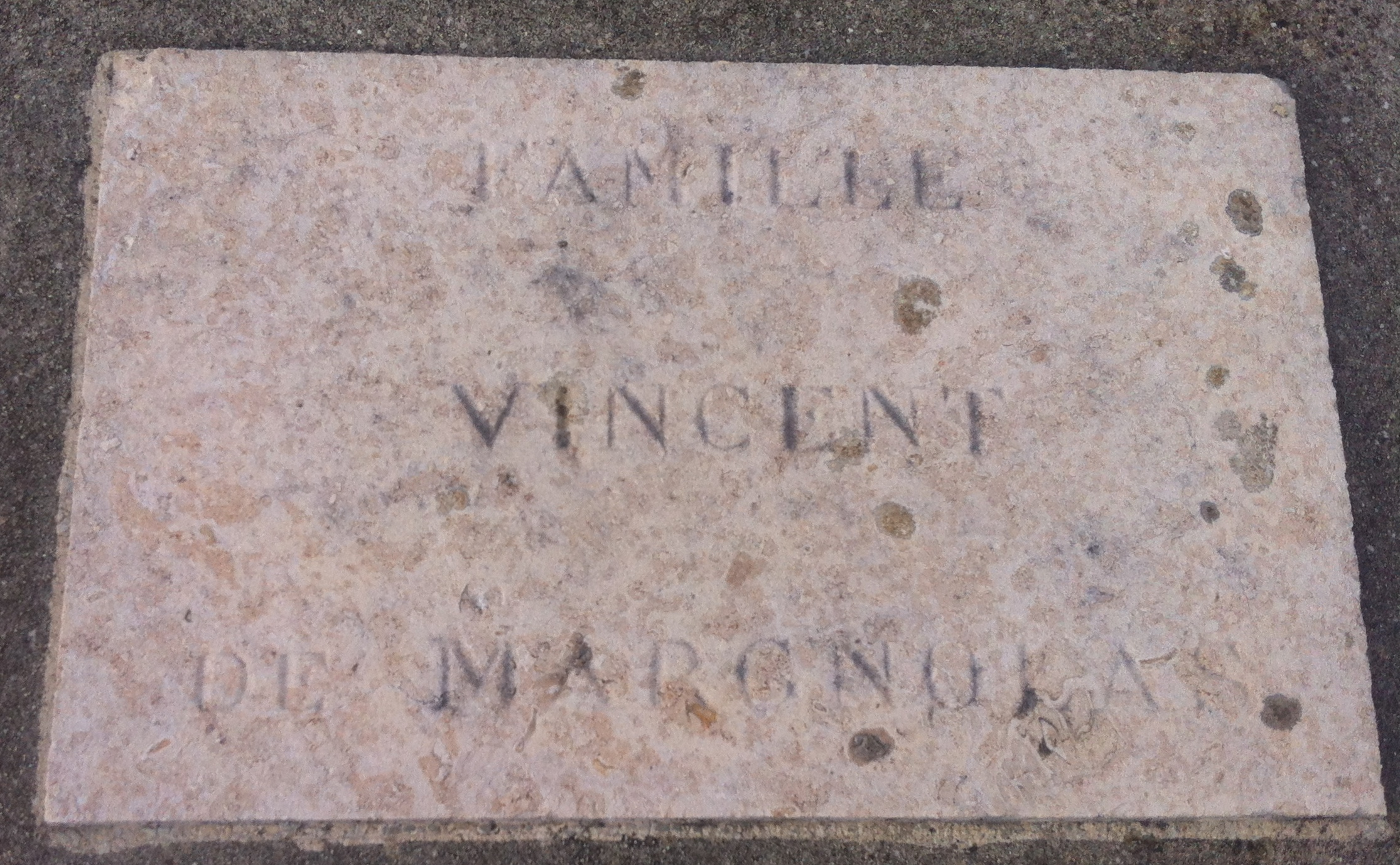 Plaque du caveau familial d'Étienne Vincent-Marniola à Beynost. Famille Vincent de Margnolas.